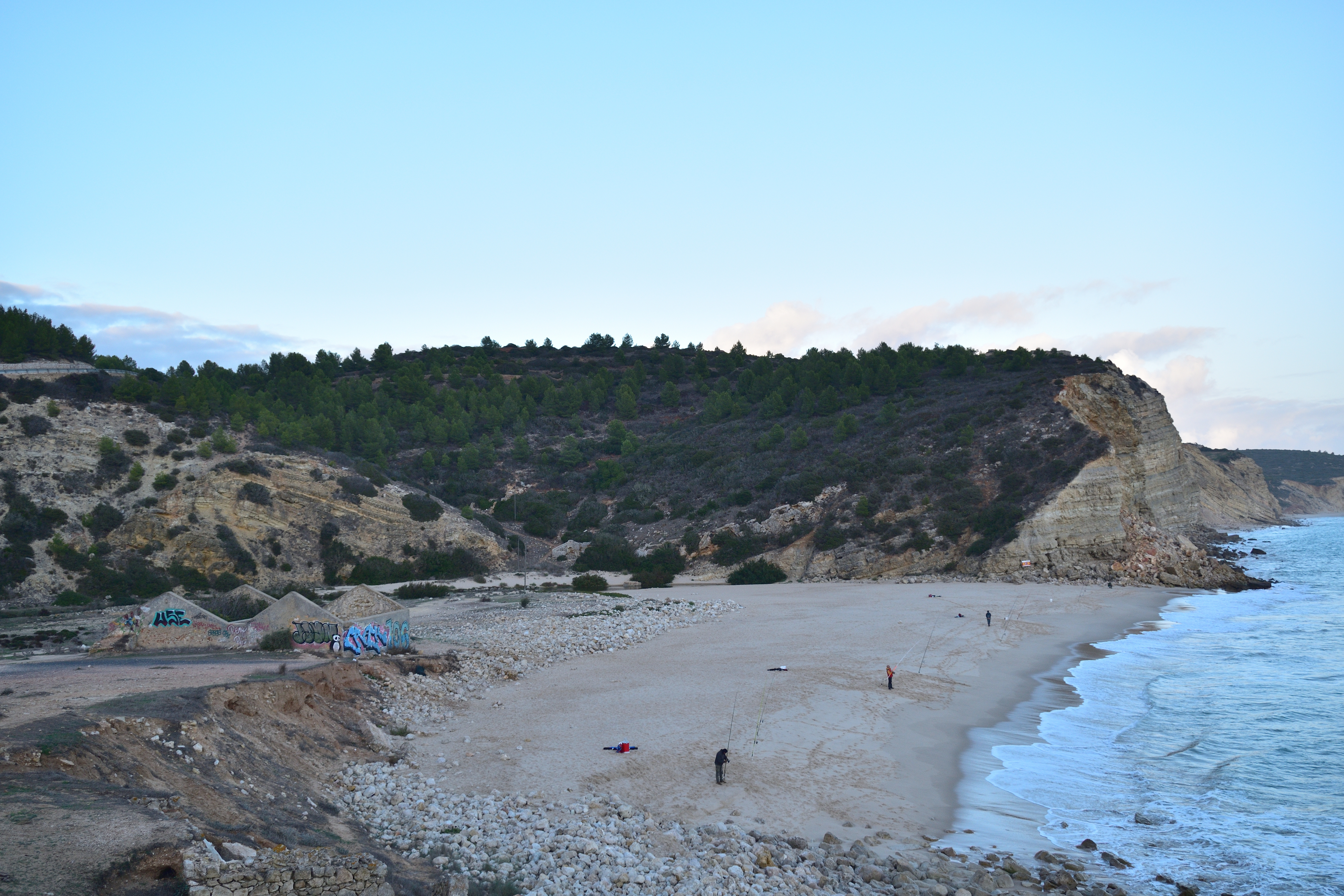 Foz do antigo estuário da Boca do Rio, no concelho de Vila do Bispo, em Portugal.